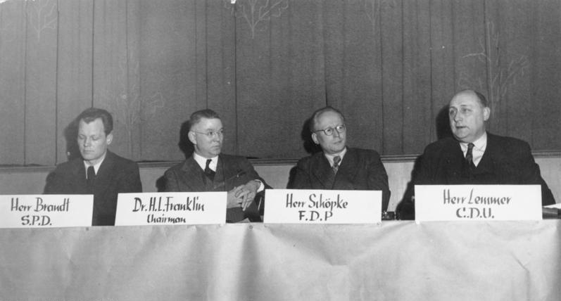 Unter dem Vorsitz von Dr. Franklin (Omgus) fand am 16.3.49 im Amerika-Haus [in Berlin] eine Diskusssion über das Thema "Bonn und Berlin" statt. Ernst Lemmer von der CDU trat bei dieser Diskussion zum ersten Mal seit langer Zeit wieder an die Öffentlichkeit. dpd-bratke ADN-Bildarchiv / Illus-dpd Deutschland 1949 Im Amerikahaus (in Berlin?) fand am 16.3.1949 unter Leitung von Dr. H.L. Franklin vom OMGUS eine Diskussion zum Thema "Bonn und Berlin" statt, an der sich Willy Brandt (SPD), Schöpke (FDP) und Ernst Lemmer (CDU) beteiligten. 2945-49